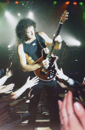 Brian May - koncert w Stodole w Warszawie 30.09.98. Autor Wikipedysta:Kozlorf